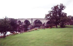 Stirling Bridge (eigen vakantieemo)